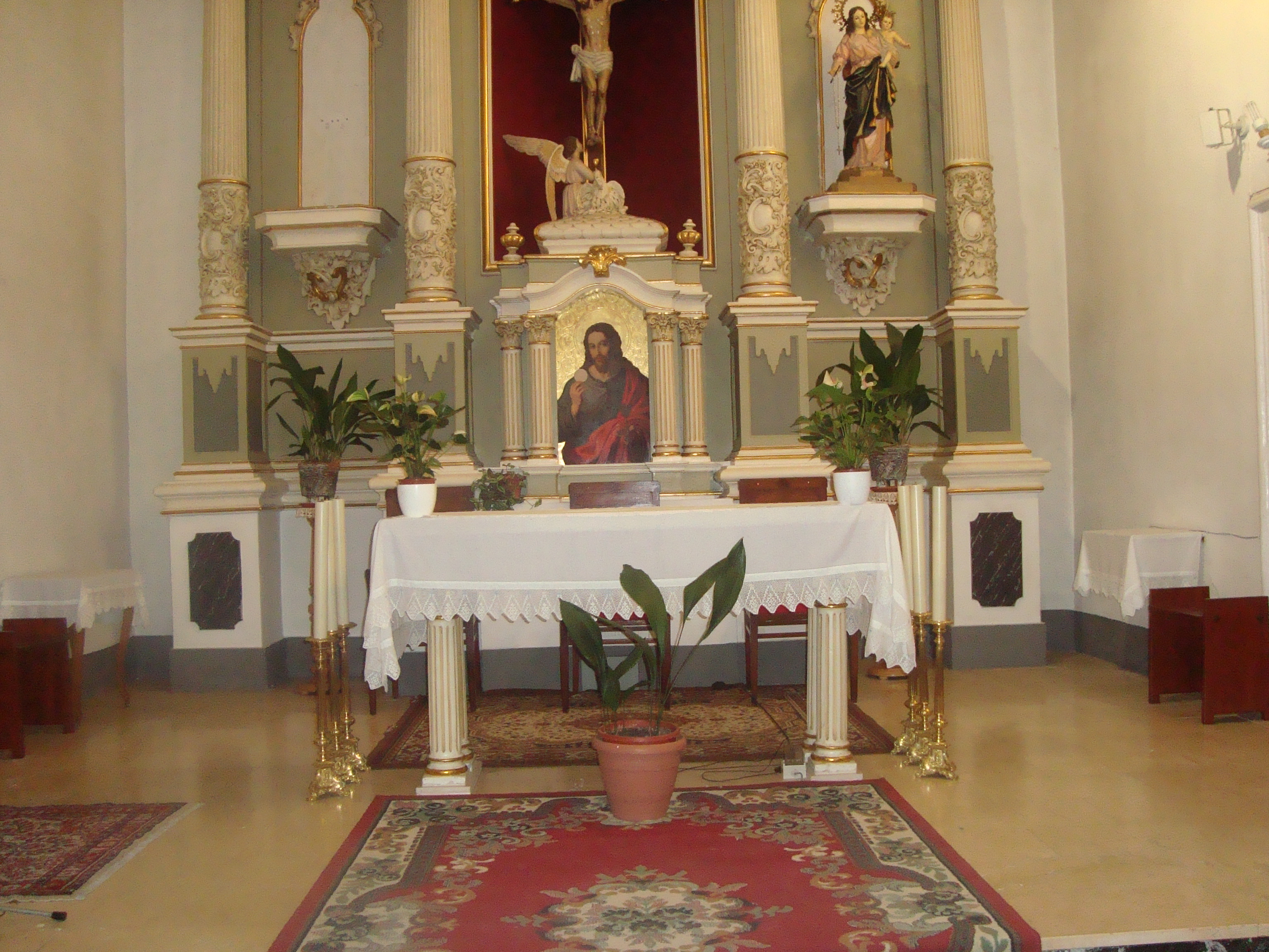 Interior de la Iglesia de El Salvador, data del siglo XVII